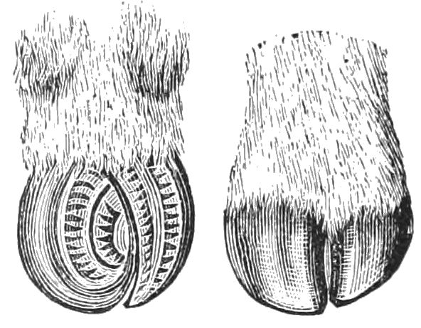 Musk ox hooves